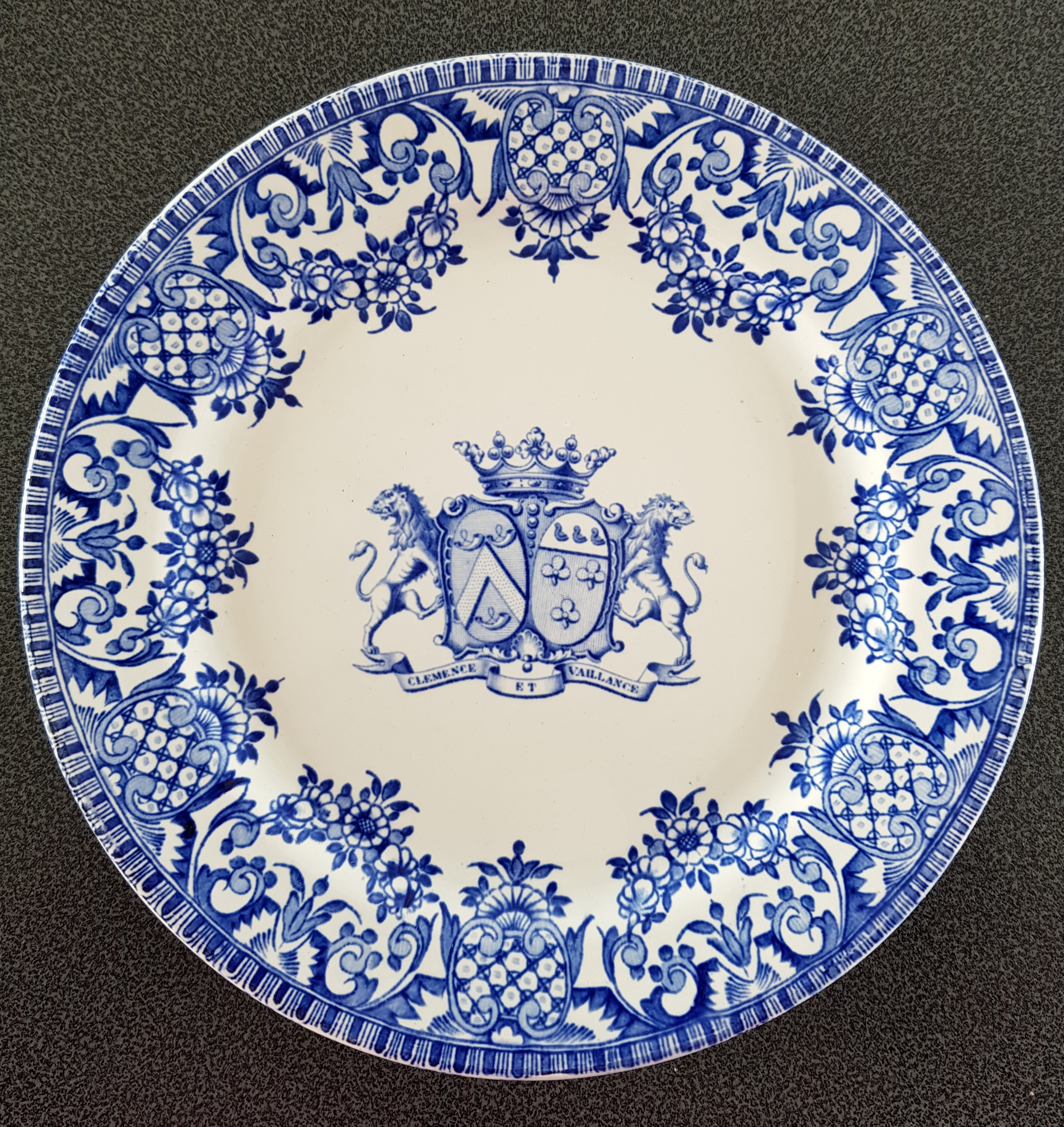 Assiette de Gien avec armoiries